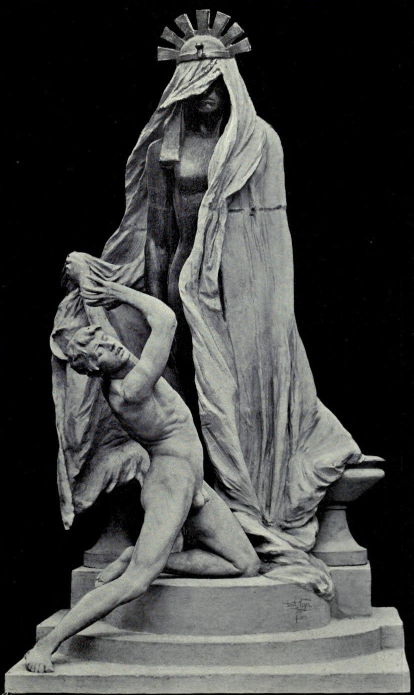 Ernst Seger: The Veiled Image of Sais, ausgestellt 1897